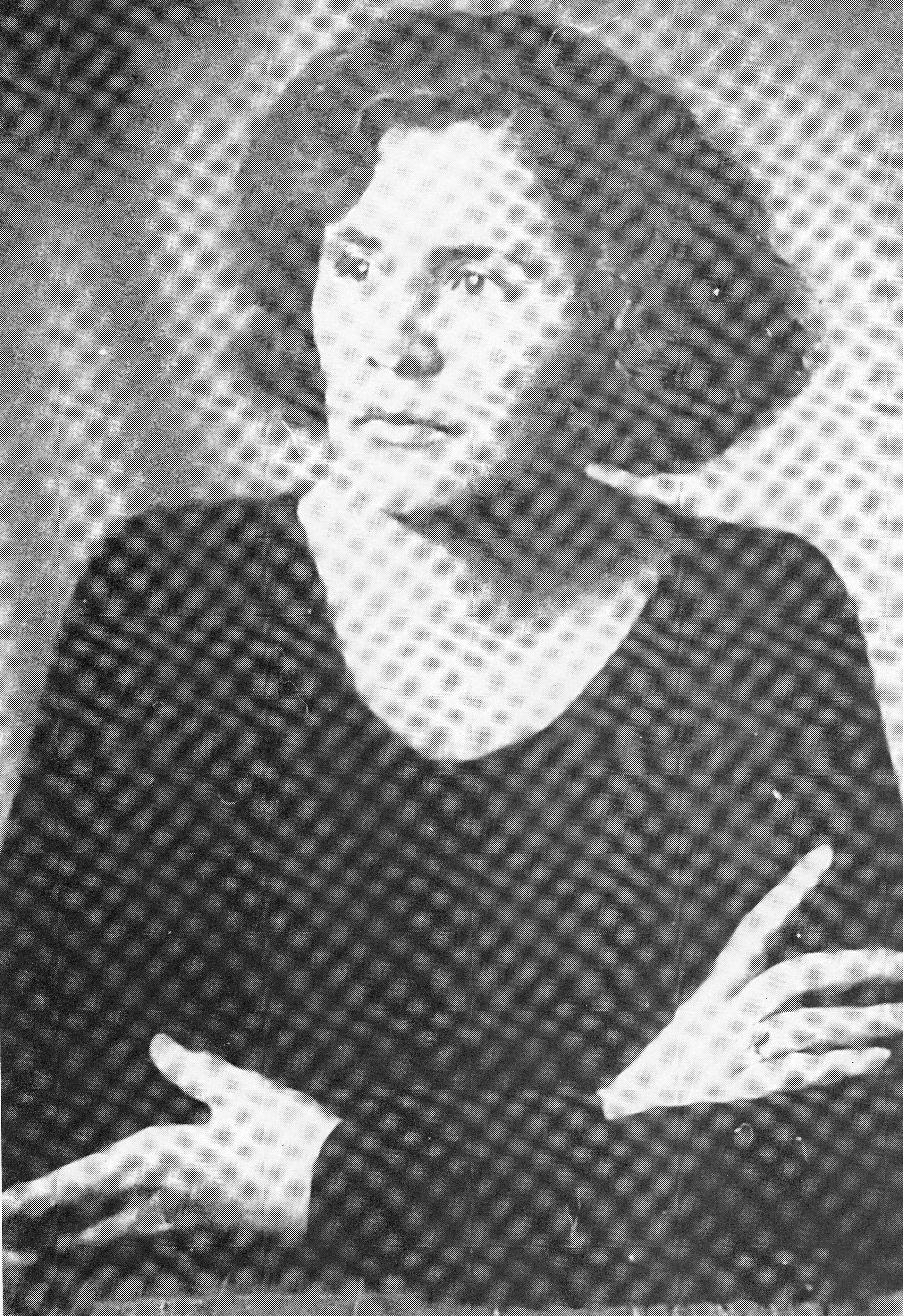 Die Burgkunstadter Heimatdichterin und Autorin Kuni Tremel-Eggert